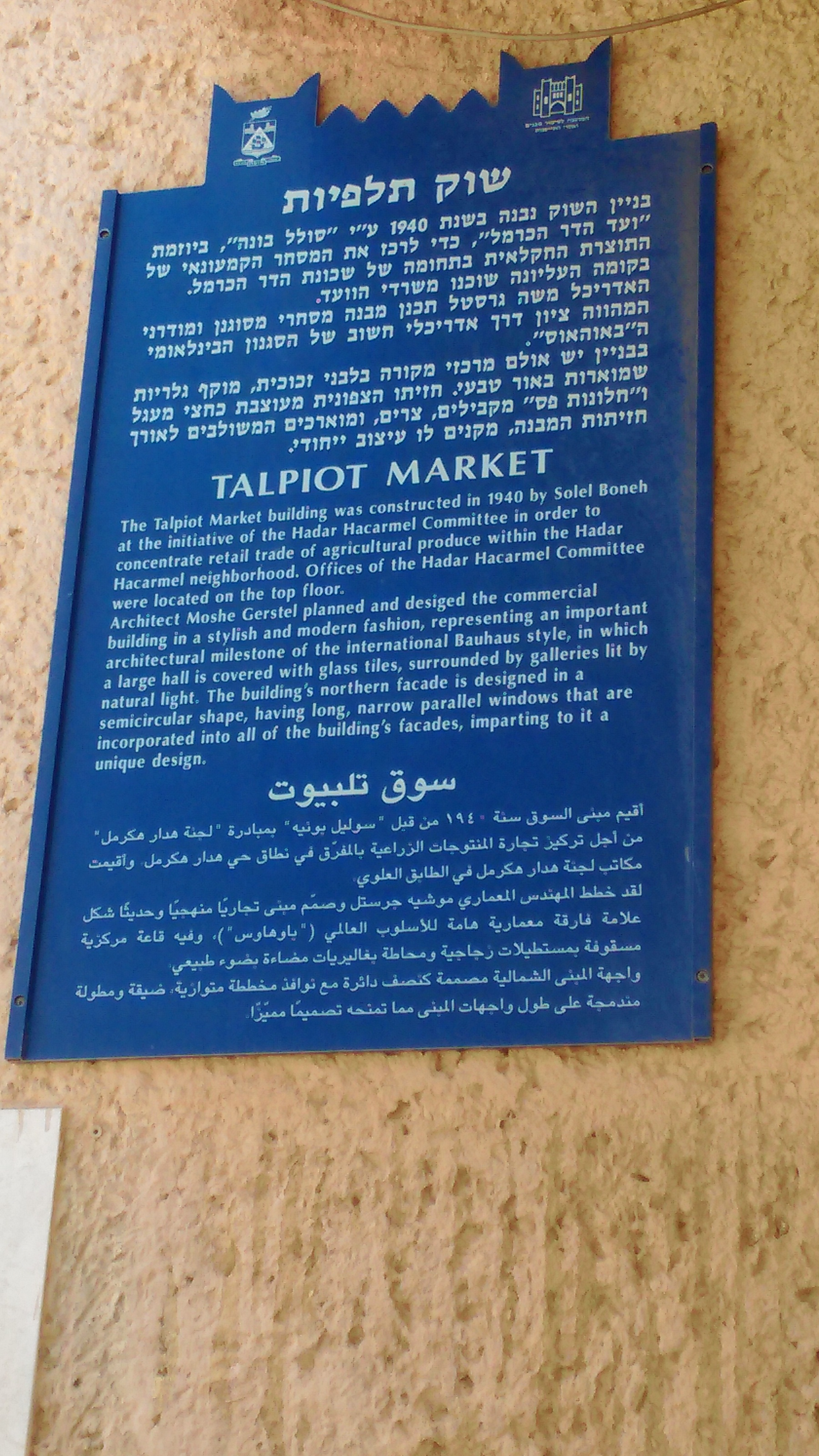 שלט הסבר, שוק תלפיות